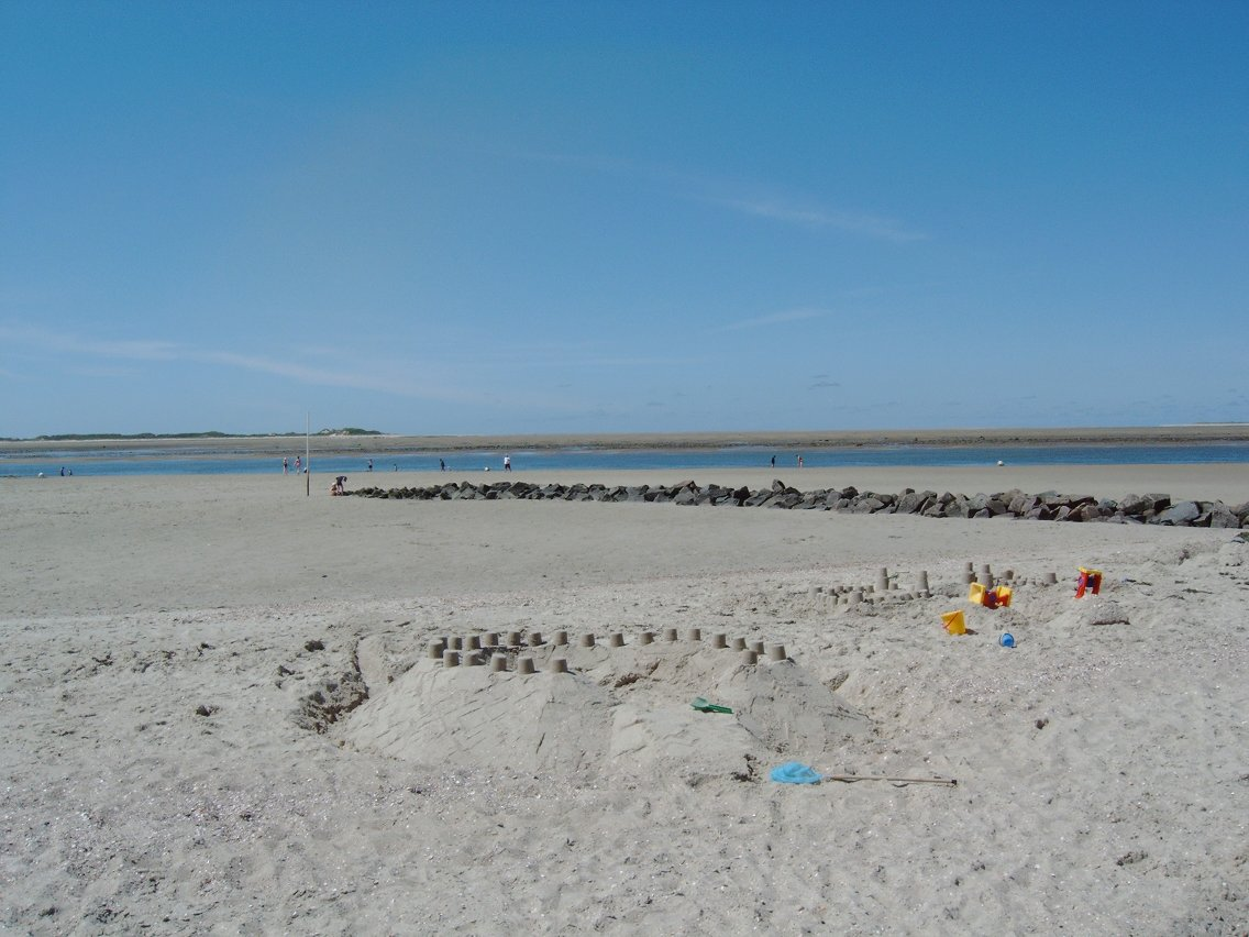 Strand bei Utersum bei Ebbe mit Blick auf die Nordspitze von Amrum; eigene Fotografie, GNU-FDL